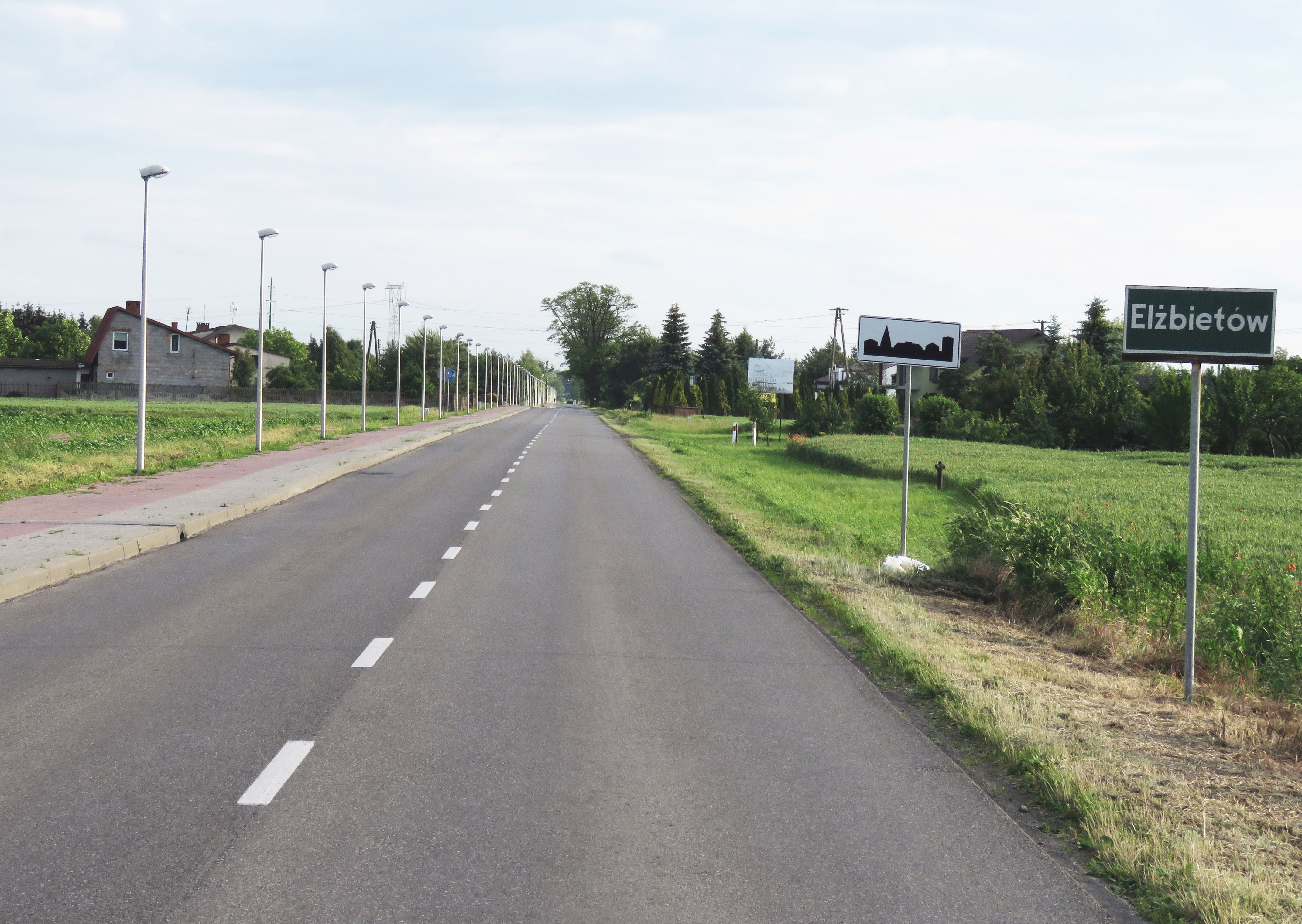 Elżbietów, gmina Teresin